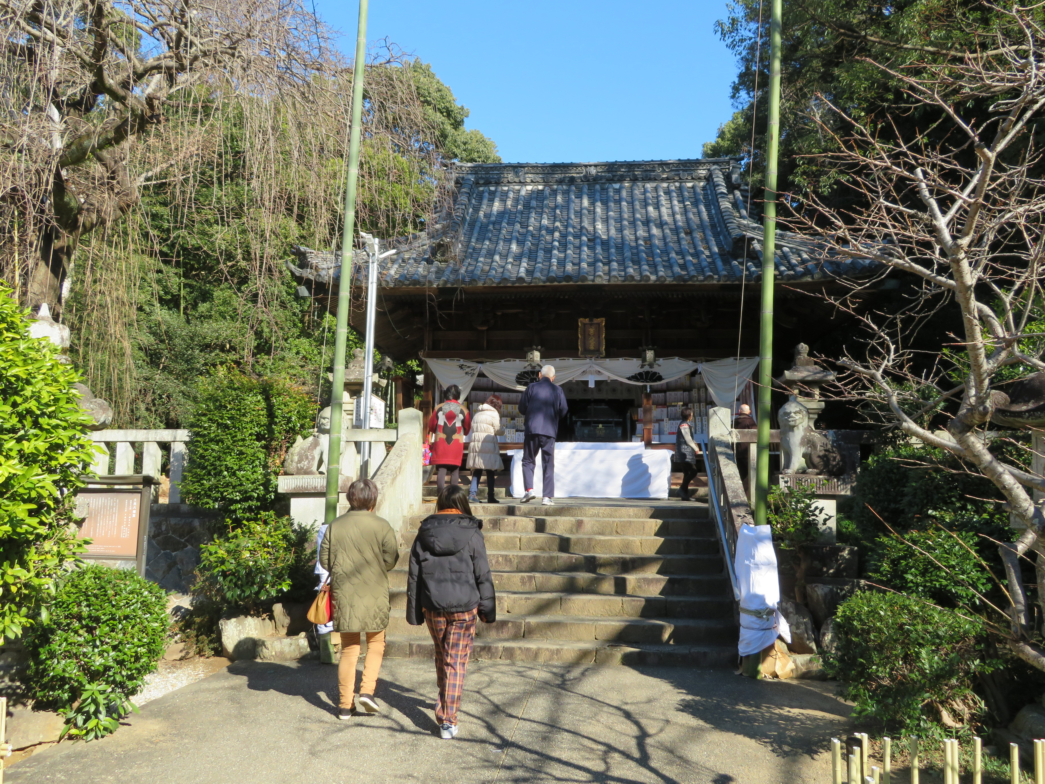 土呂八幡宮（岡崎市福岡町）